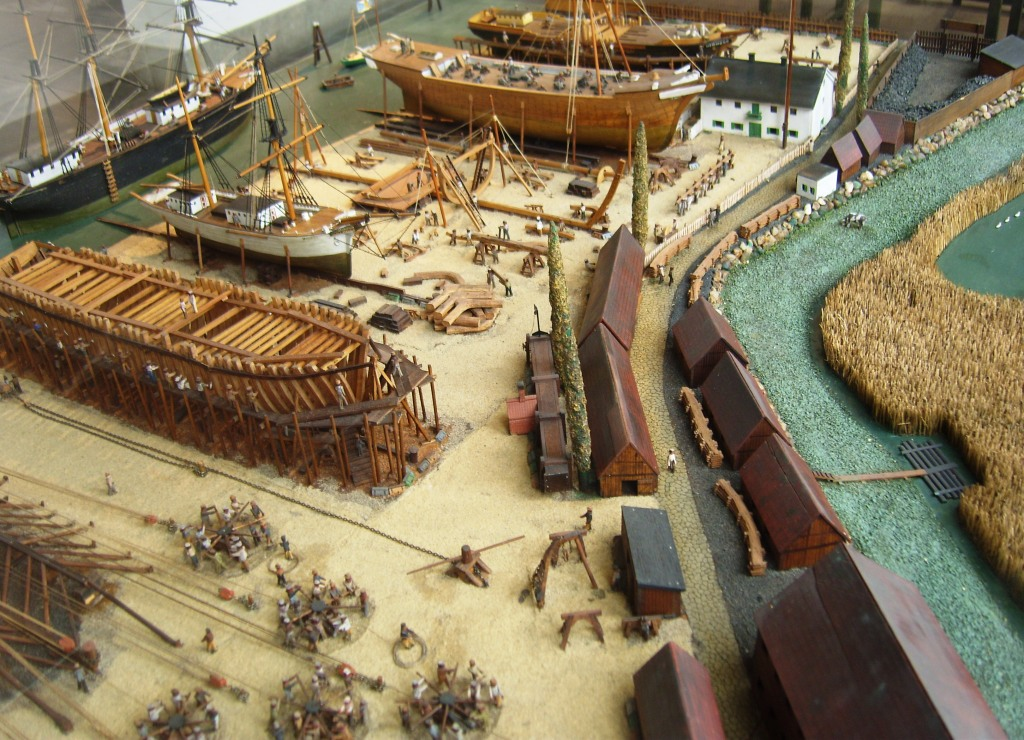 Schiggswerft von Somm